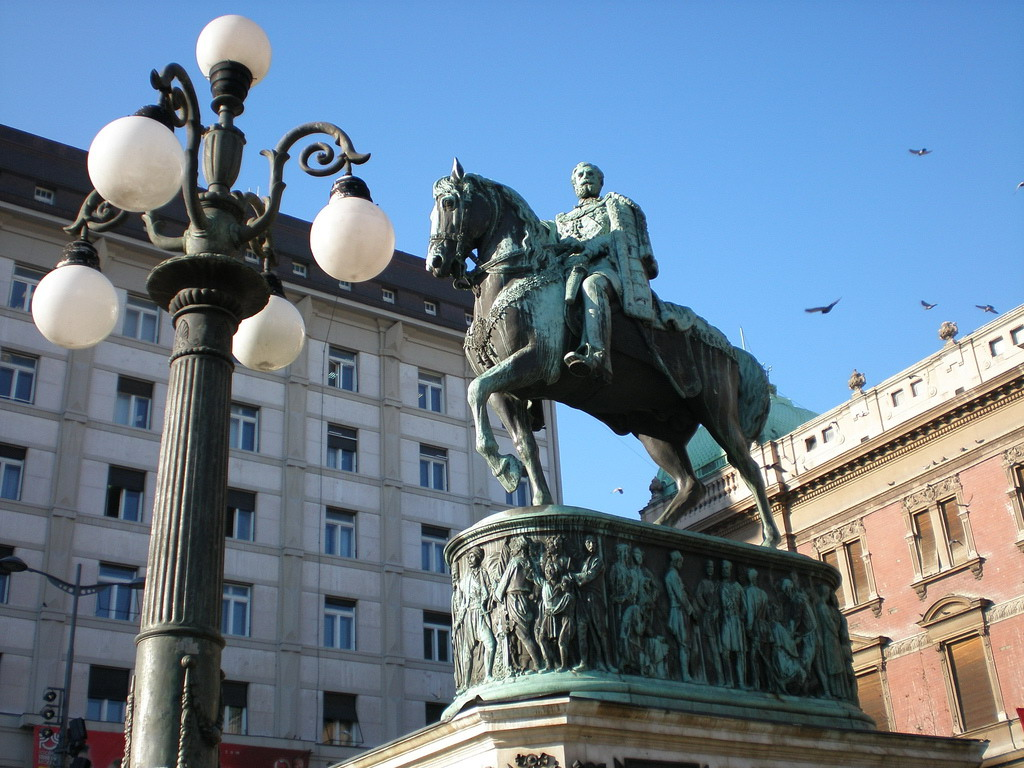 Republic Square in Belgrade